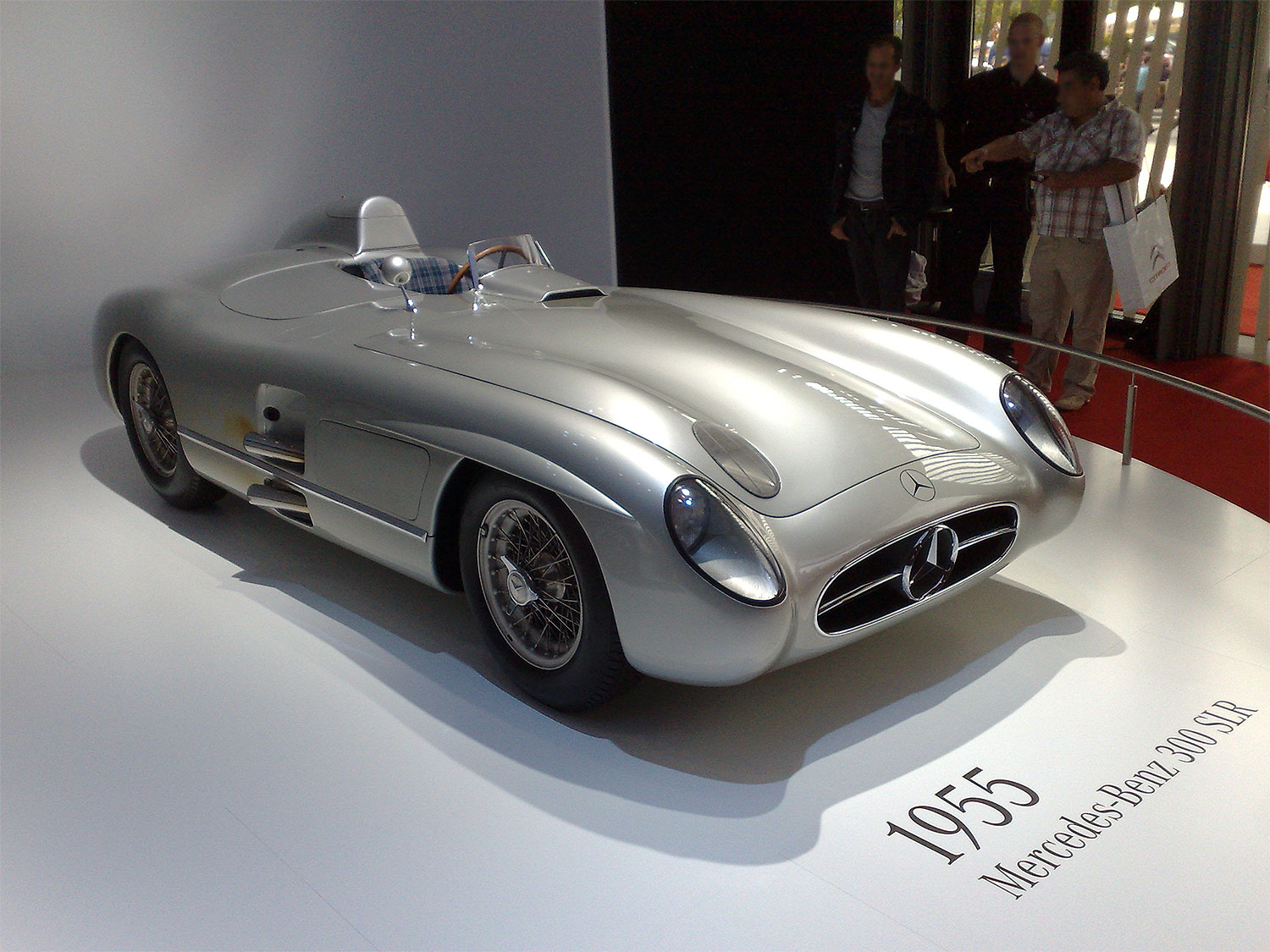 Mercedes-Benz 300 SLR auf der IAA 2009